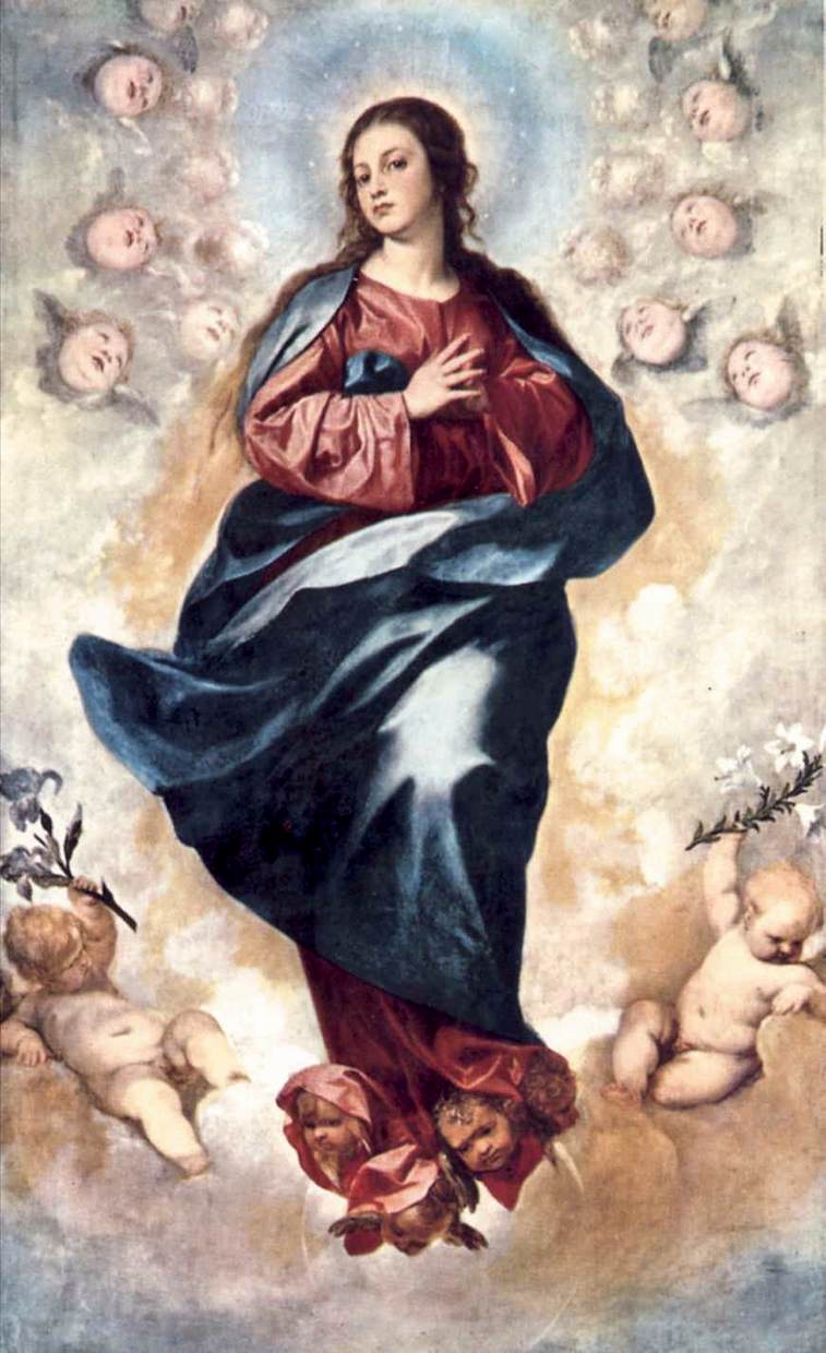 La obra representa la Inmaculada Concepción de la Virgen María, madre de Jesucristo. La obra pertenece a la parroquia de la Asunción de Ntra. Sra. de Berantevilla, aunque está depositada en el Museo Diocesano de Arte Sacro de Álava.